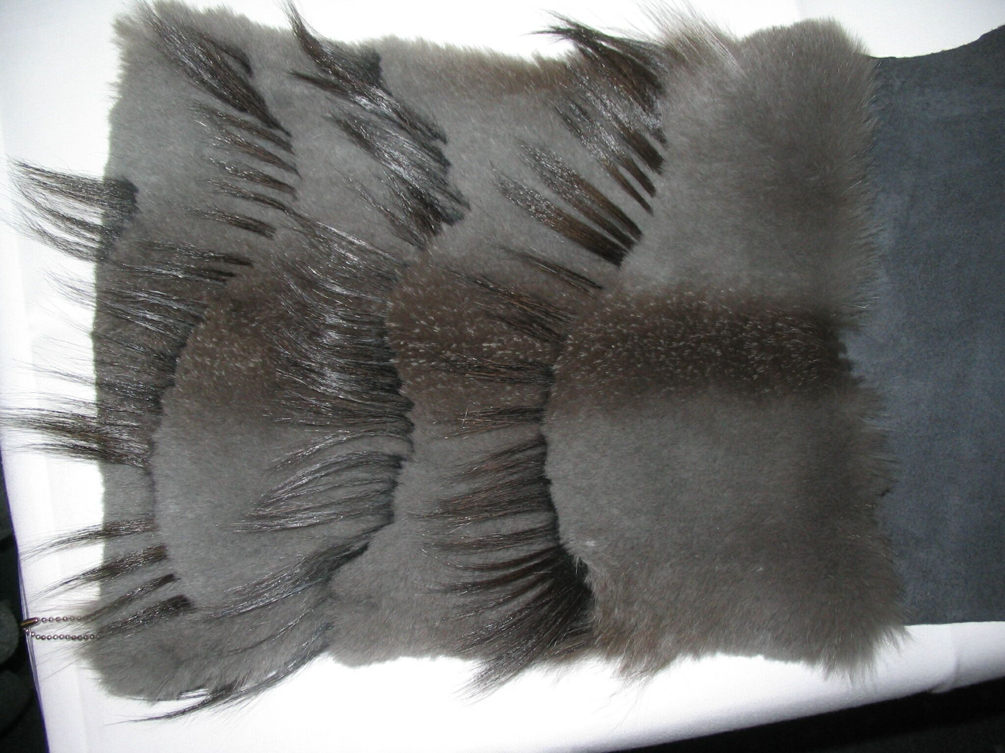 Samtnerz mit Applikation aus Ziegenfell, Haarseite. Arbeitsprobe, gesehen auf der Pelzmesse Fur & Fashion in Frankfurt am Main, 2008